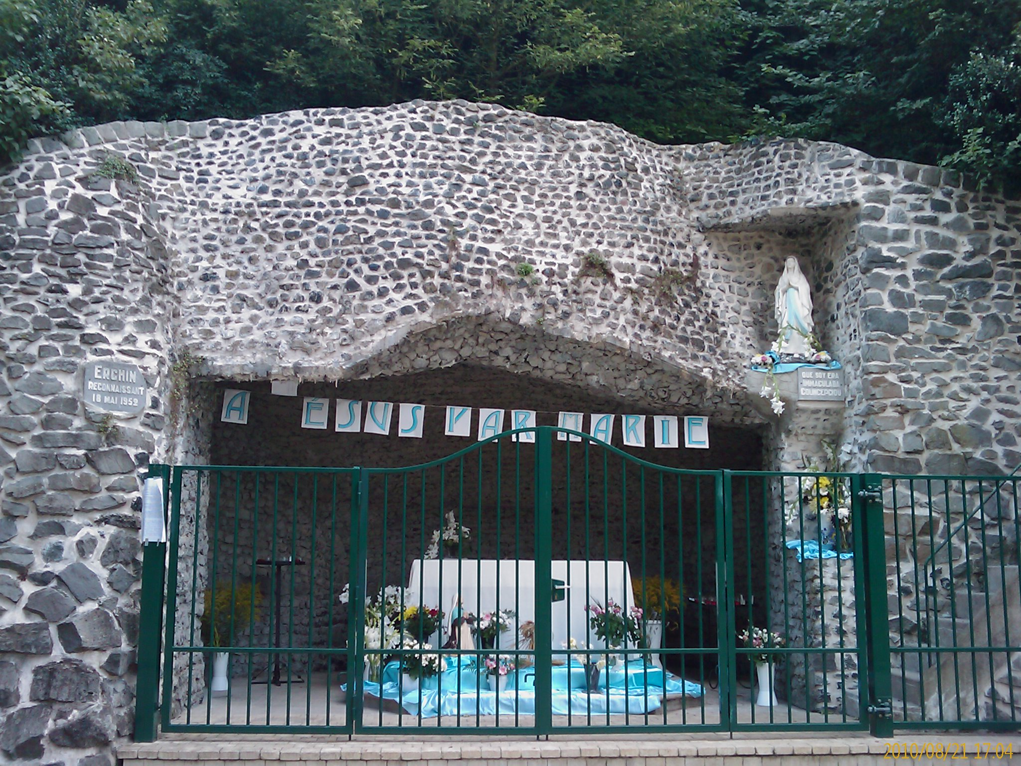 Erchin - Grotte de Lourdes